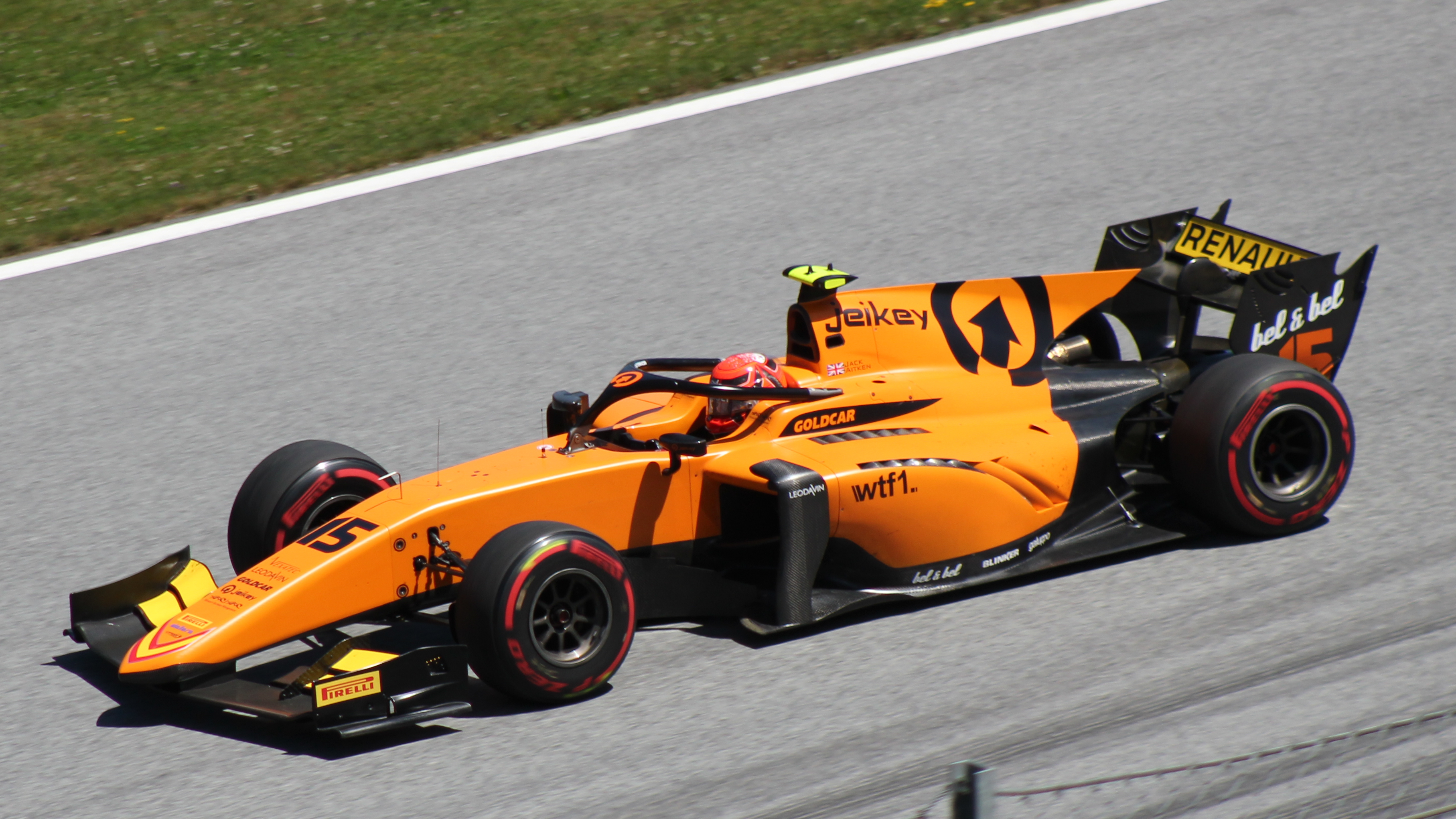 Aitken beim Rennwochenende in Österreich 2019